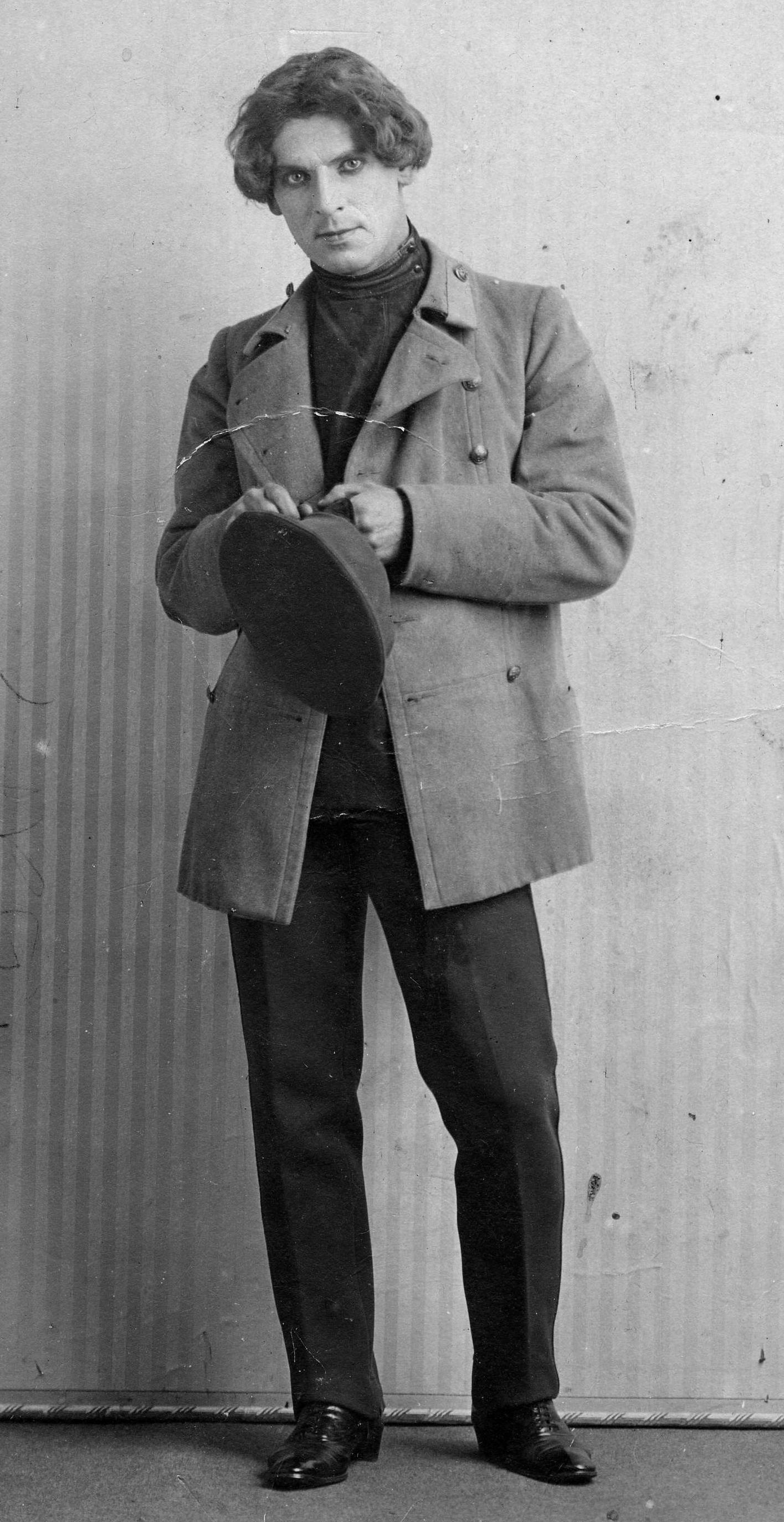 И.А.Кукарников в одном из театральных образов (конец XIX - начало XX вв.)(фото из архива С.И.Кукарникова)